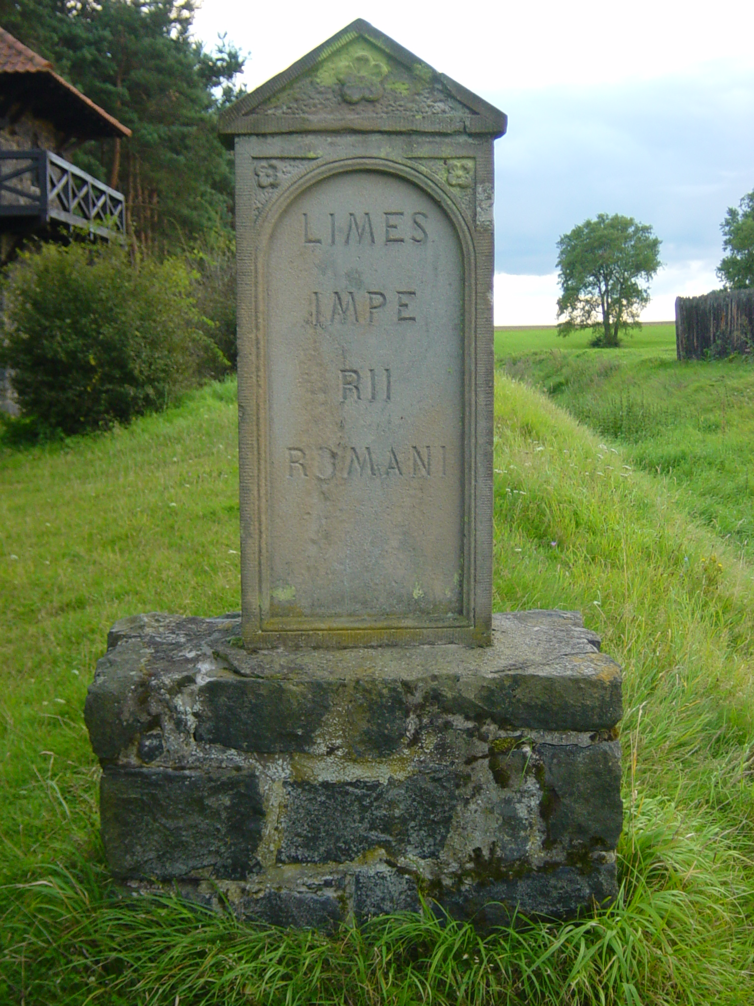 „Barbarenstein“ (1912) am Römerturm bei Pohlheim, Obergermanischer Limes